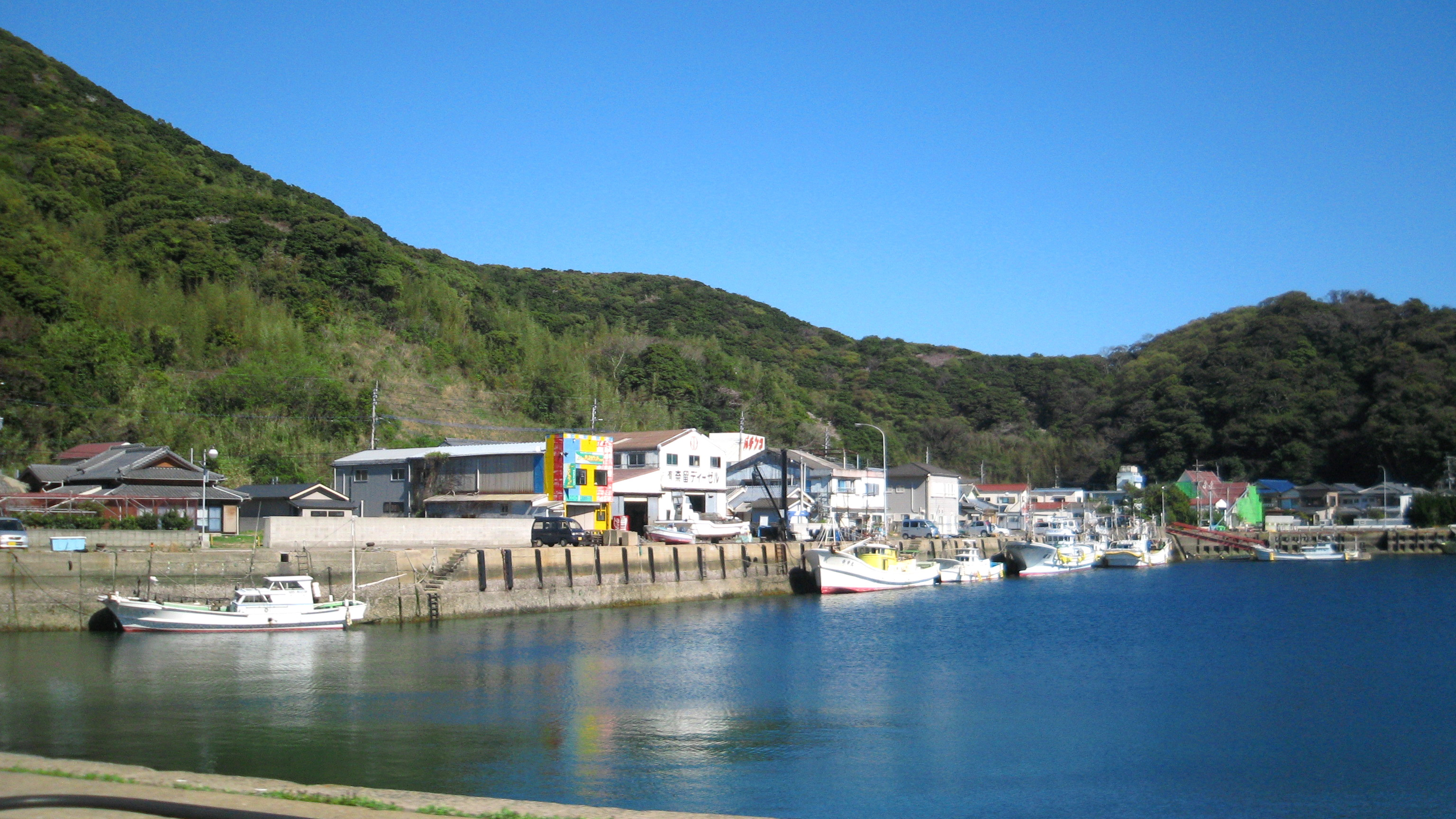 五島市奈留町